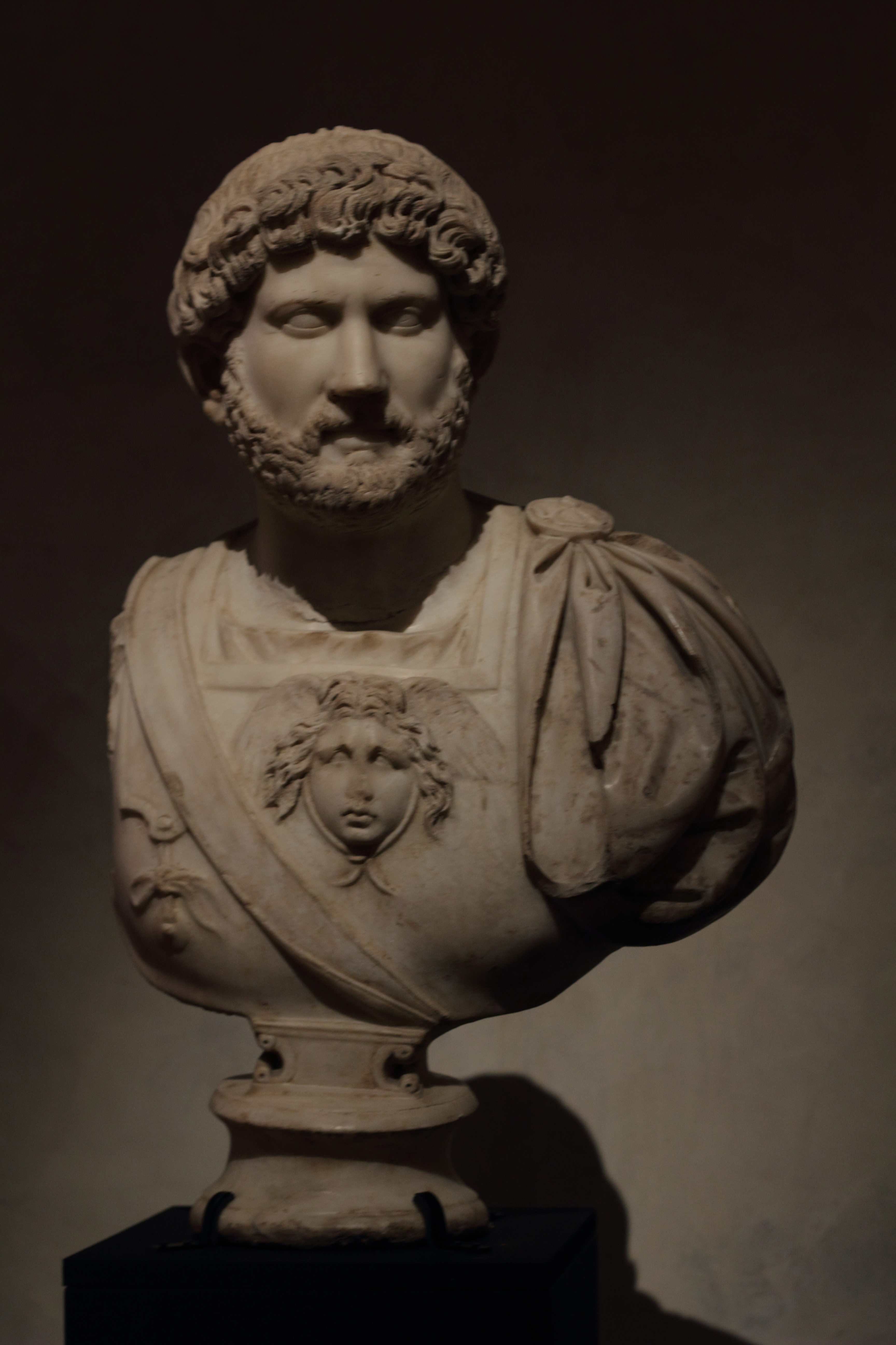 Buste cuirassé d'Hadrien